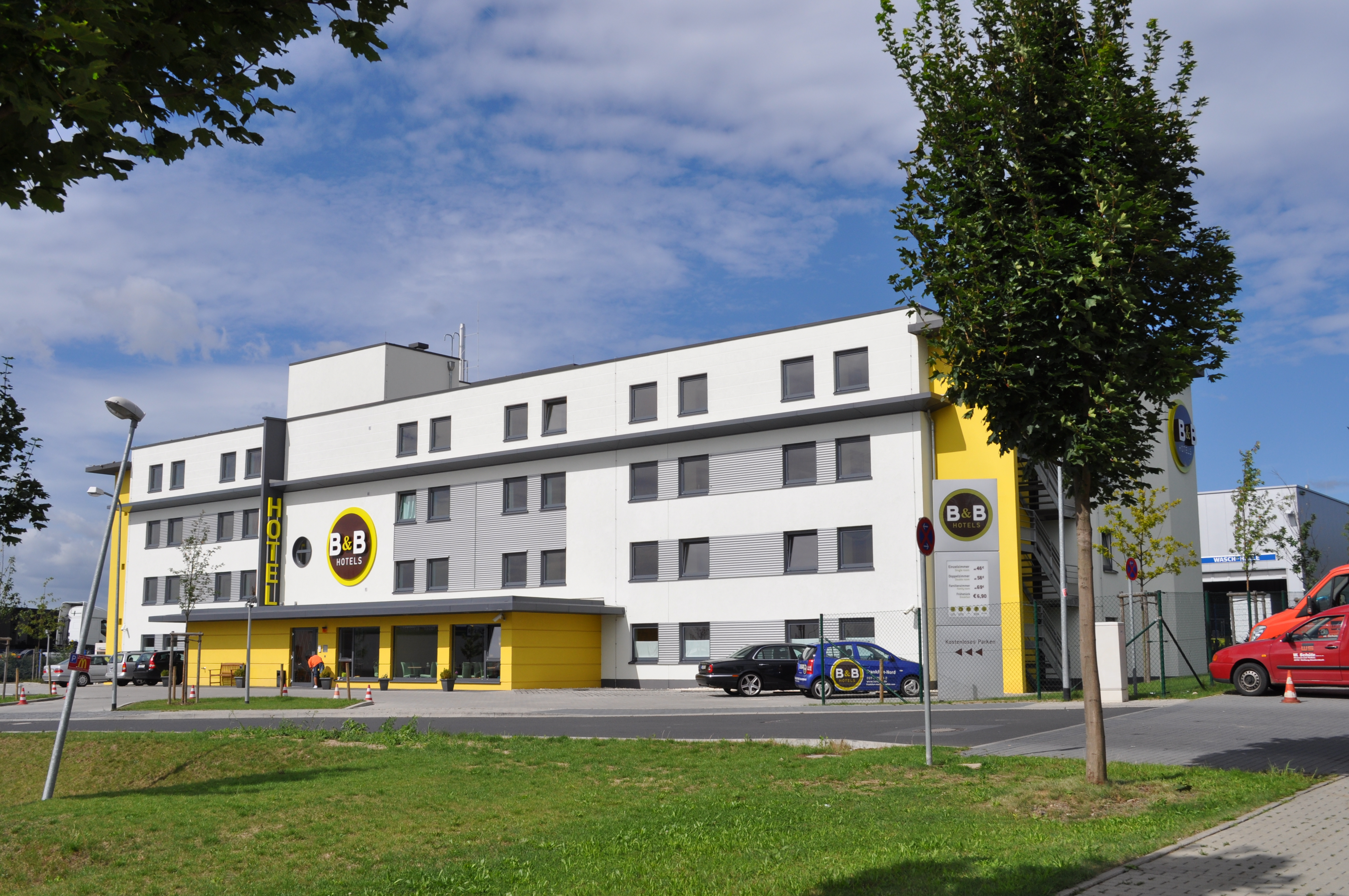 B&B Hotel in Frankfurt-Niedereschbach, Am Martinszehnten